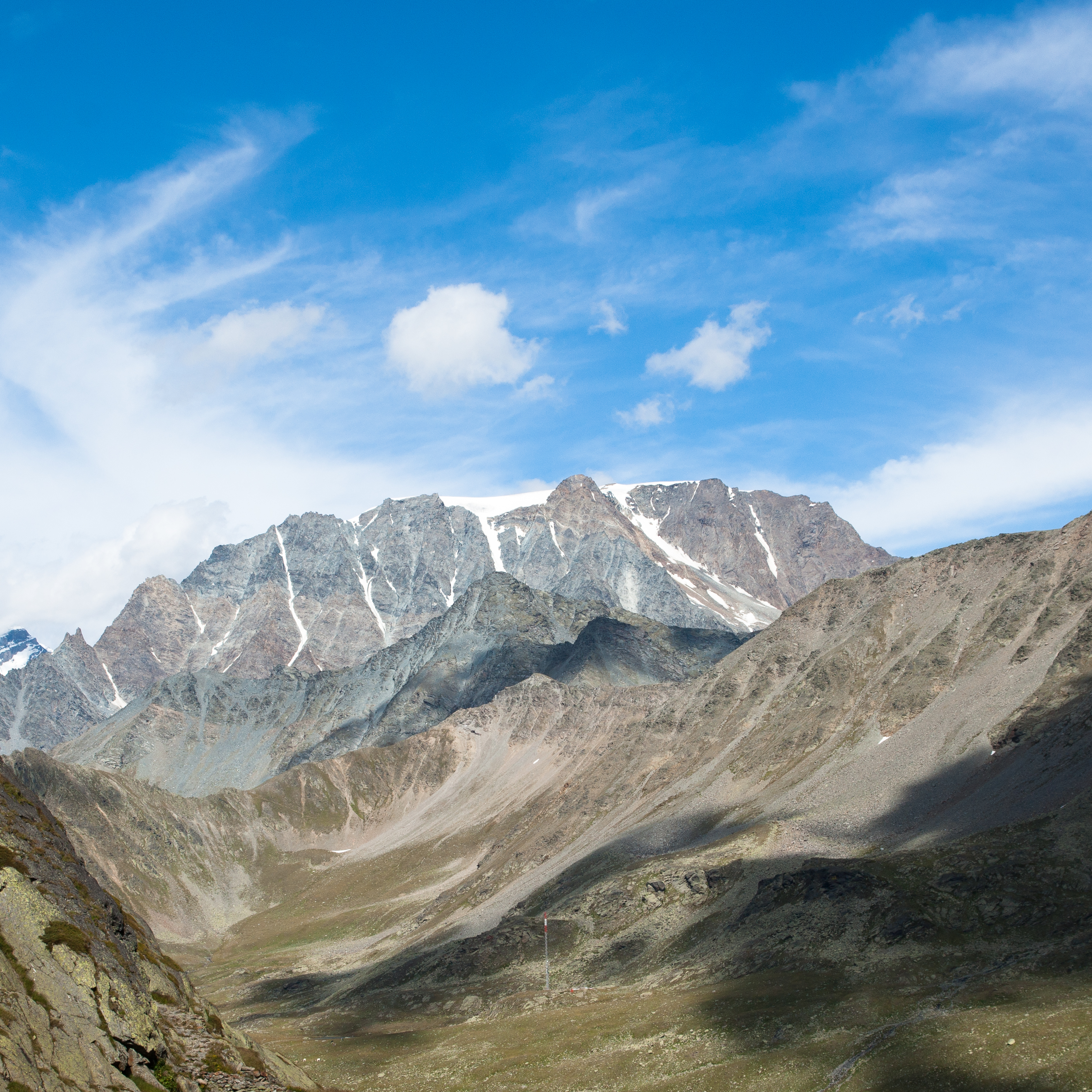 Mont Vélan depuis le Grand Saint-Bernard